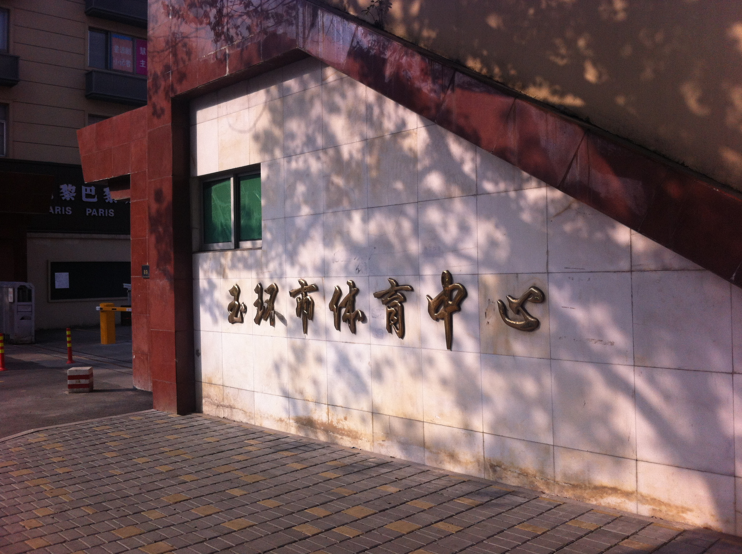 中文（中国大陆）: 玉环市体育中心